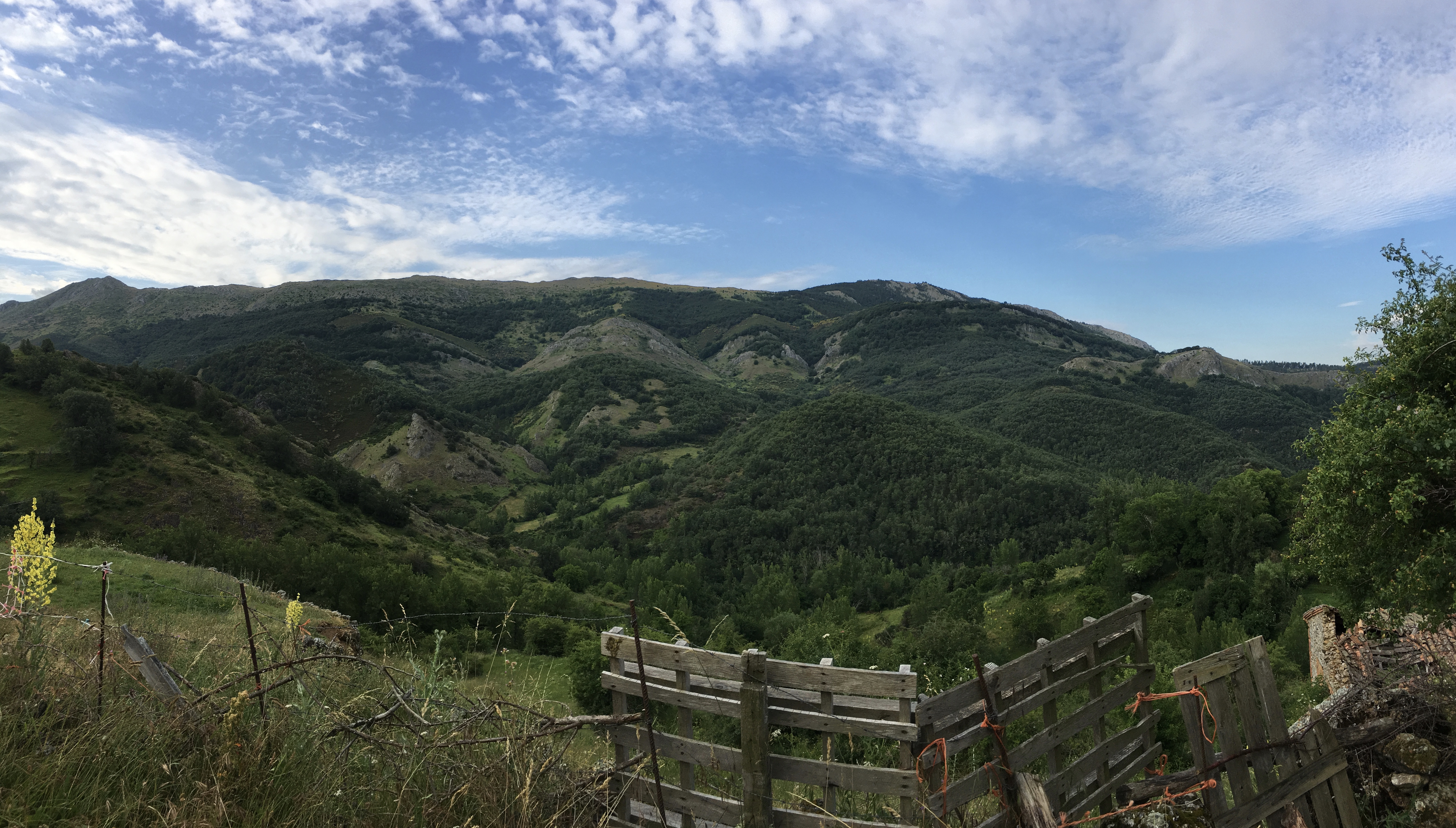 peñcorada norte